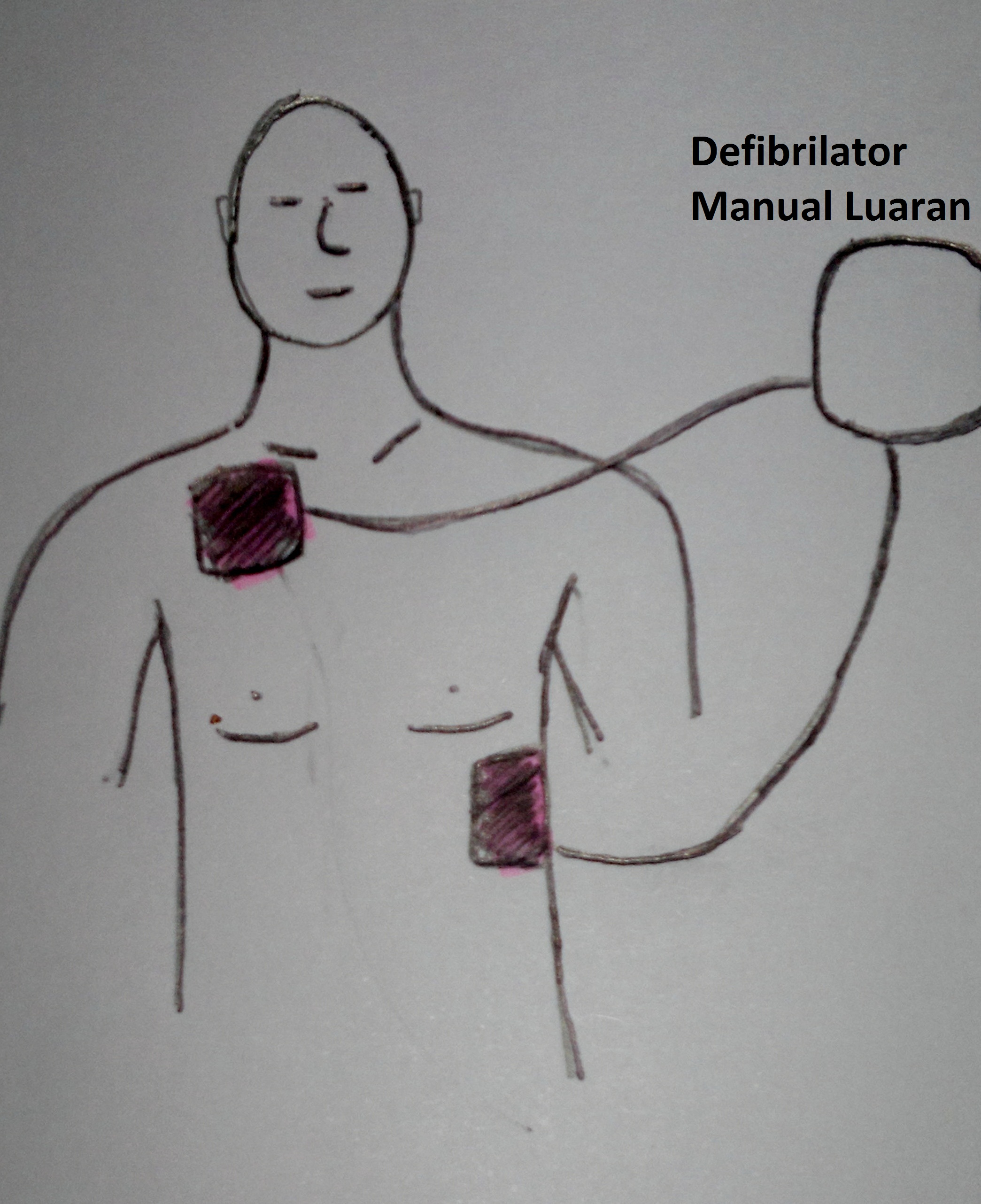 Penempatan pad Defibrilator Manual Luaran